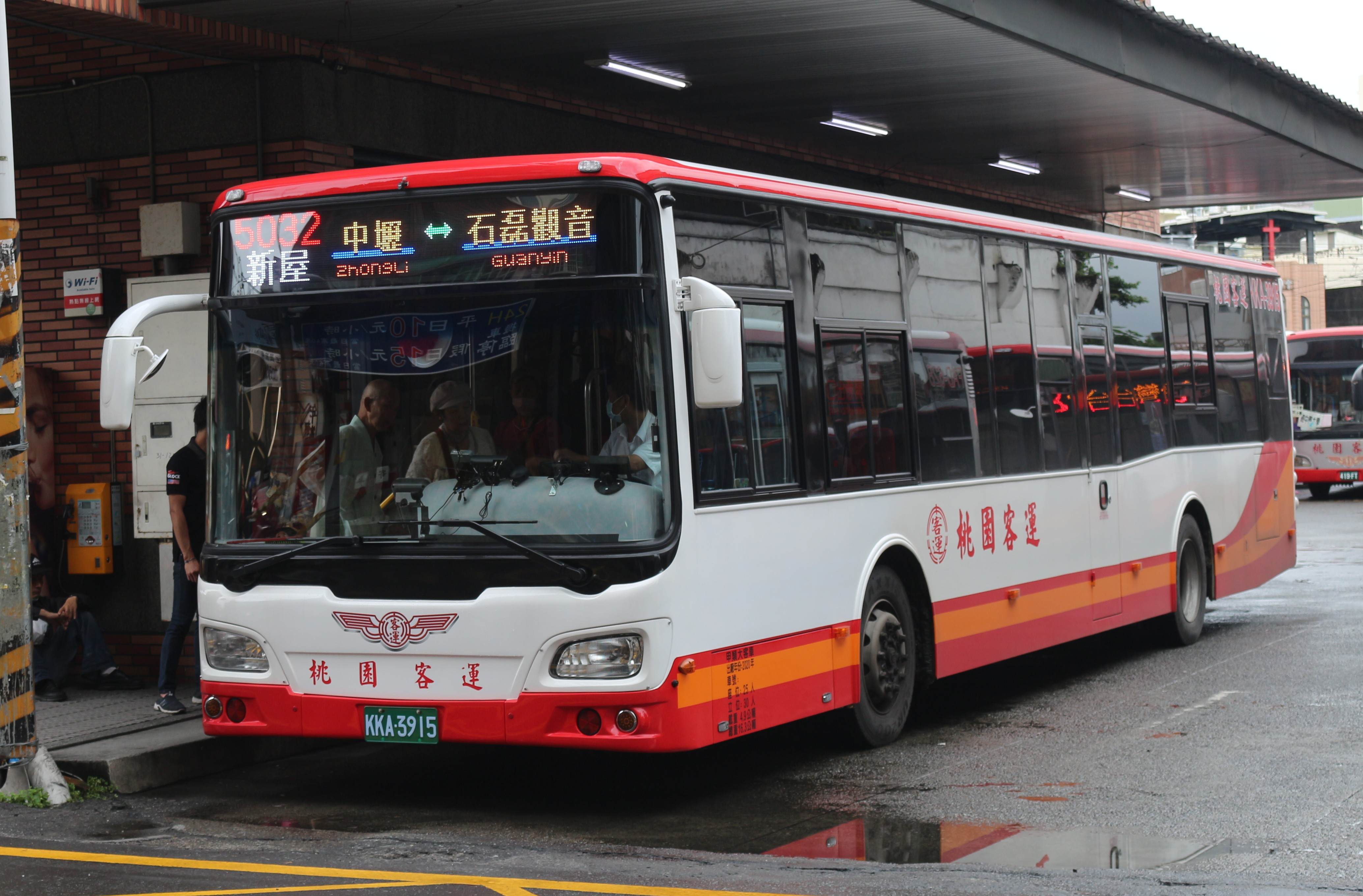 桃園客運 2020 HINO HS8JRVL-UTF KKA-3915 5032